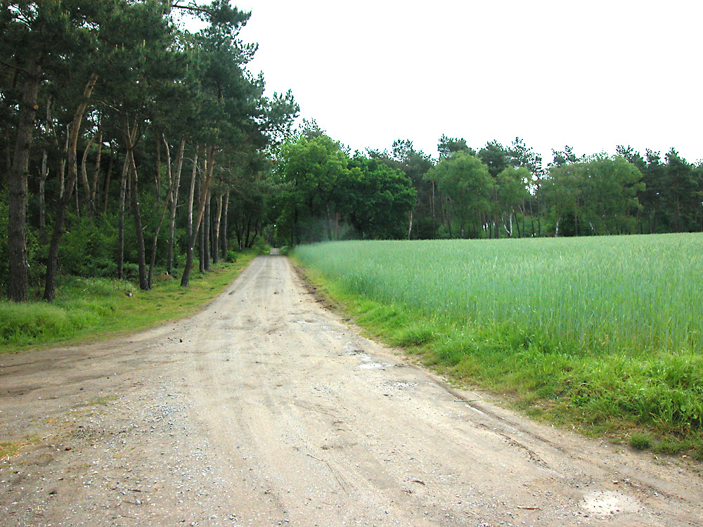 Klein Wald by Hessling. Dorsten-Rhade. West.